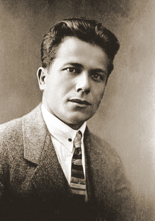 Григорий Михайлович Косынка (1899—1934) — украинский и советский писатель/